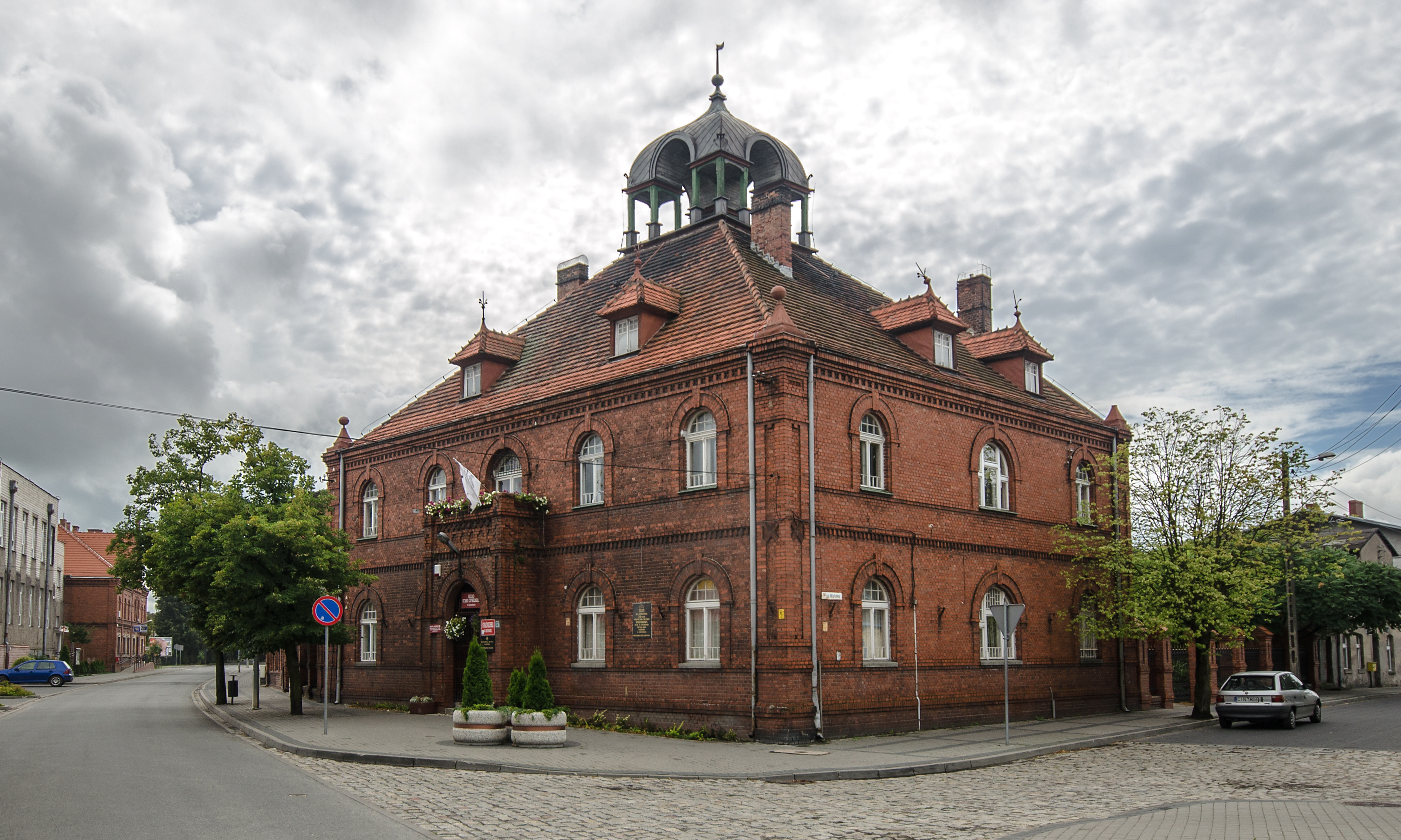 Gniewkowo, ratusz, 1908